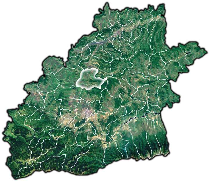 Slimnic jud Sibiu